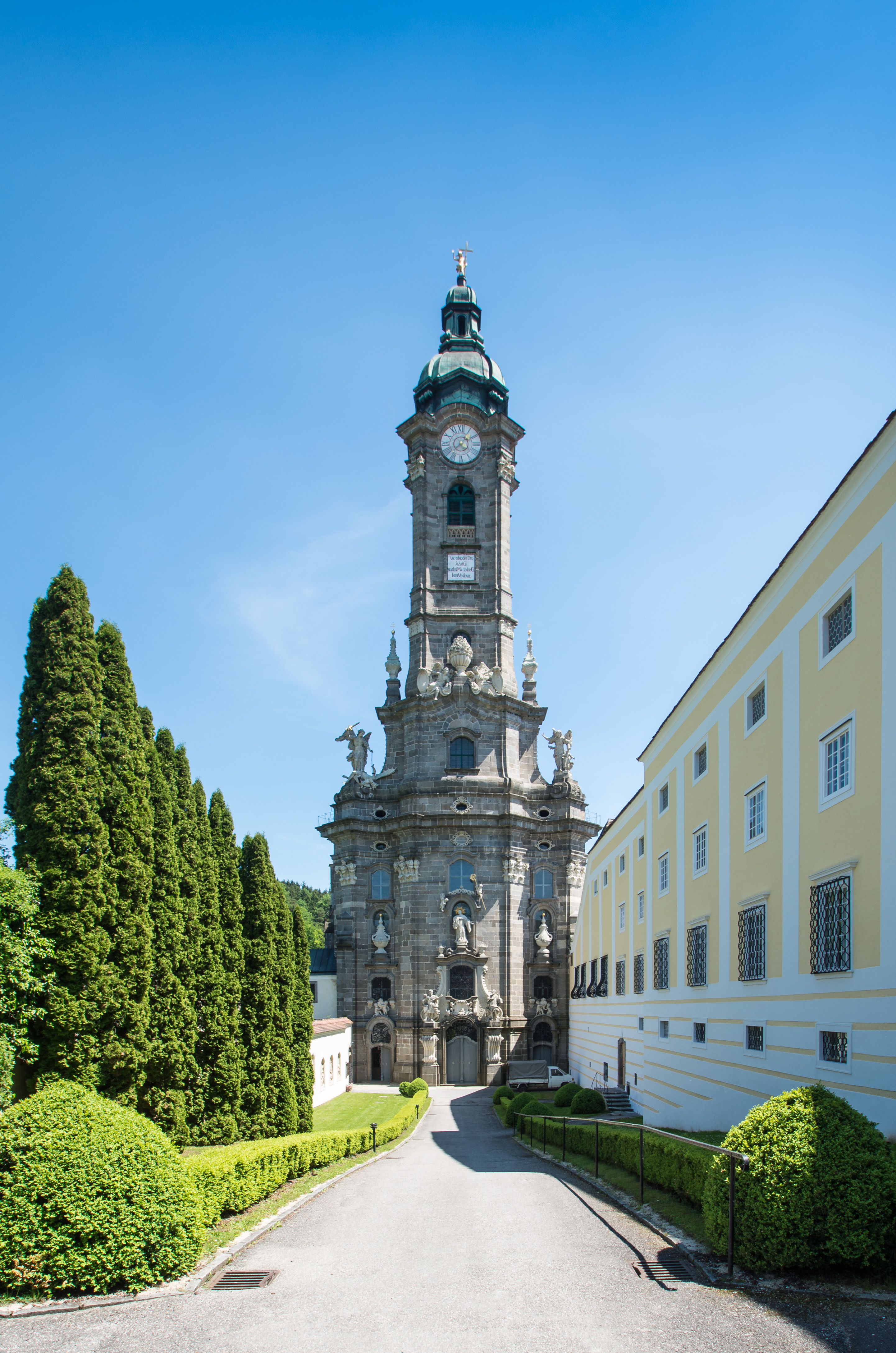 Gesamtanlage Zisterzienserstift Zwettl